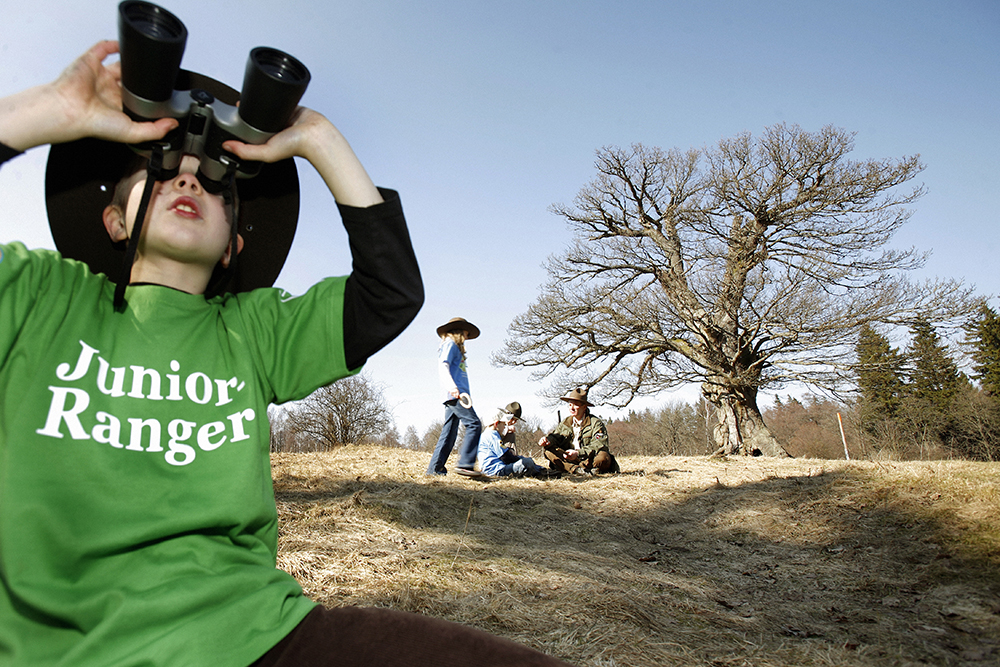 Promofoto fürs Junior-Ranger-Programm von Europarc Deutschland